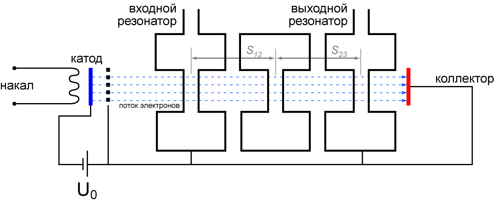 Схема многорезонаторного клистрона